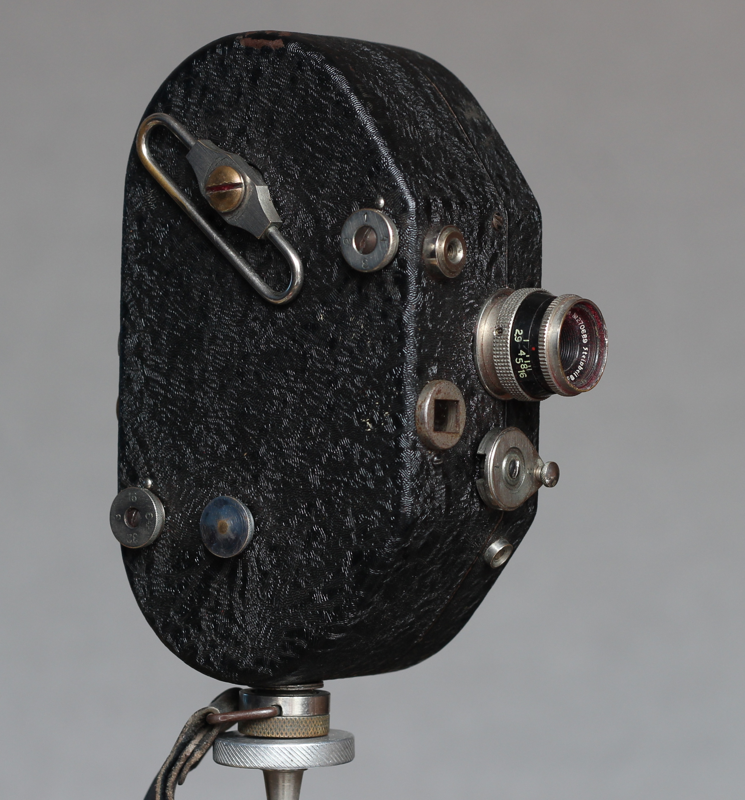 Admira pro 8 mm film zvaná ledvinka, výroba Jindřich Suchánek Brno, pohled na ovládací prvky